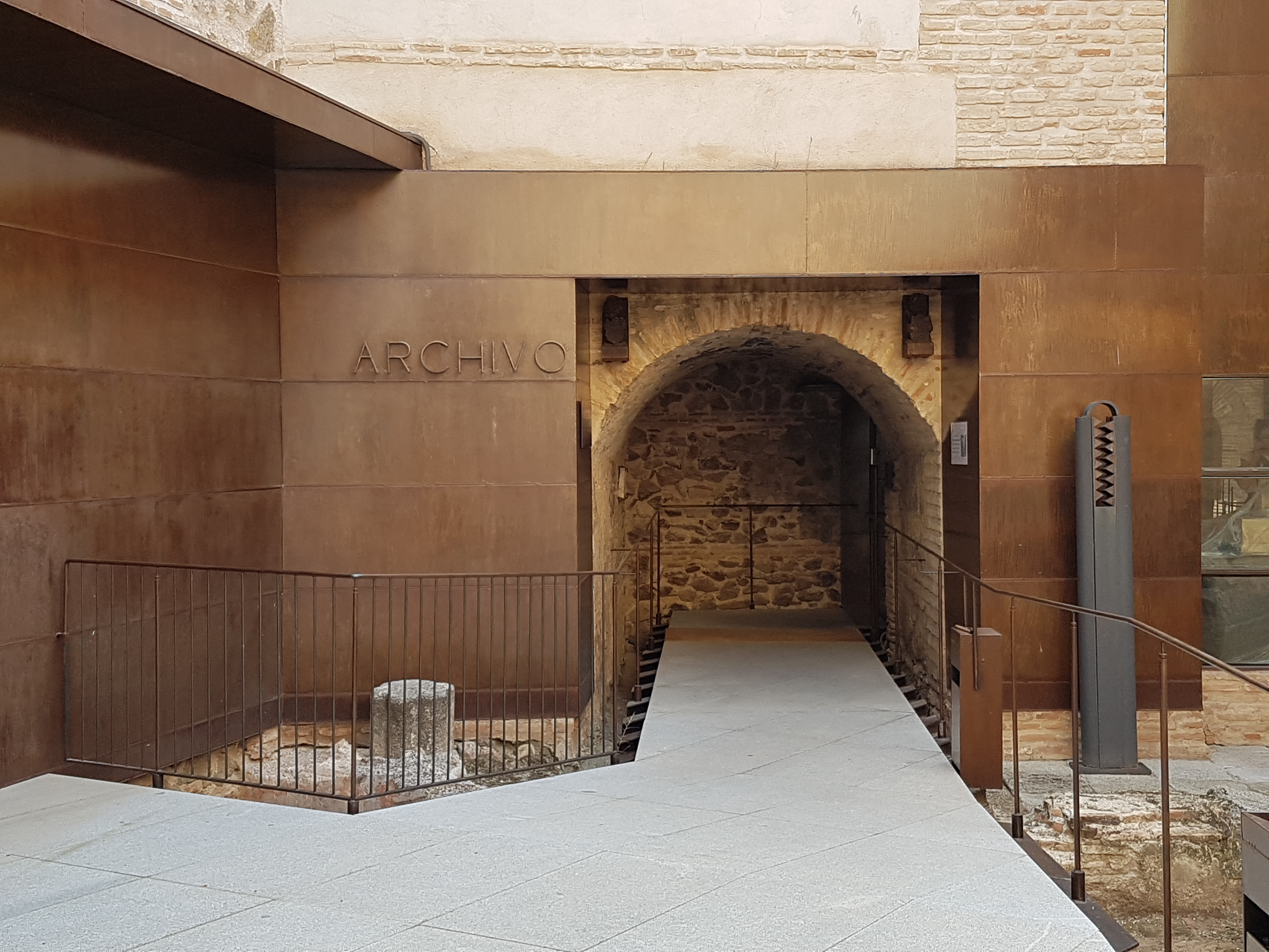 Arco de entrada al edificio histórico donde se encuentra el archivo municipal del Ayuntamiento de Toledo